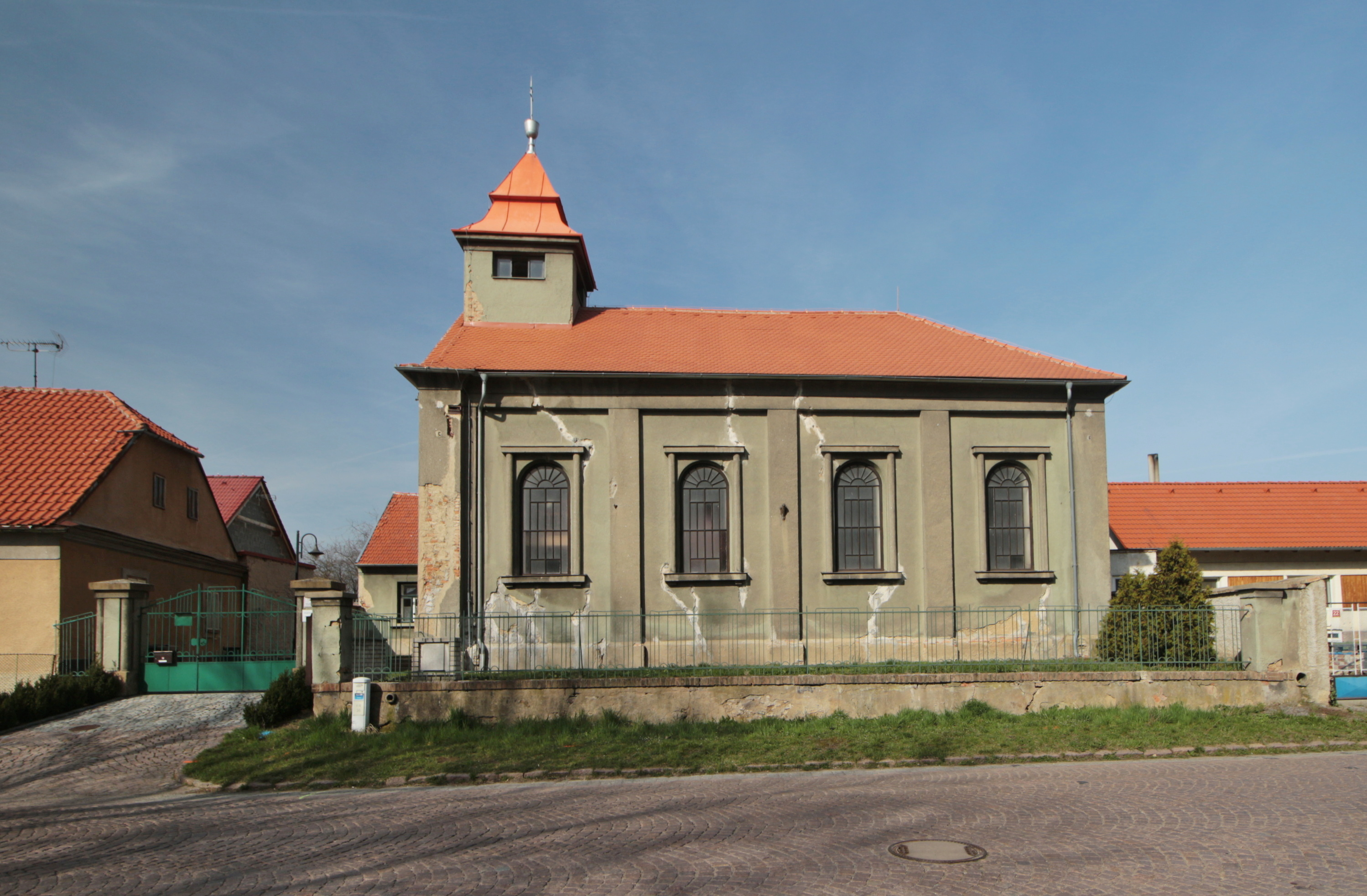 Plaňany Husitský kostel